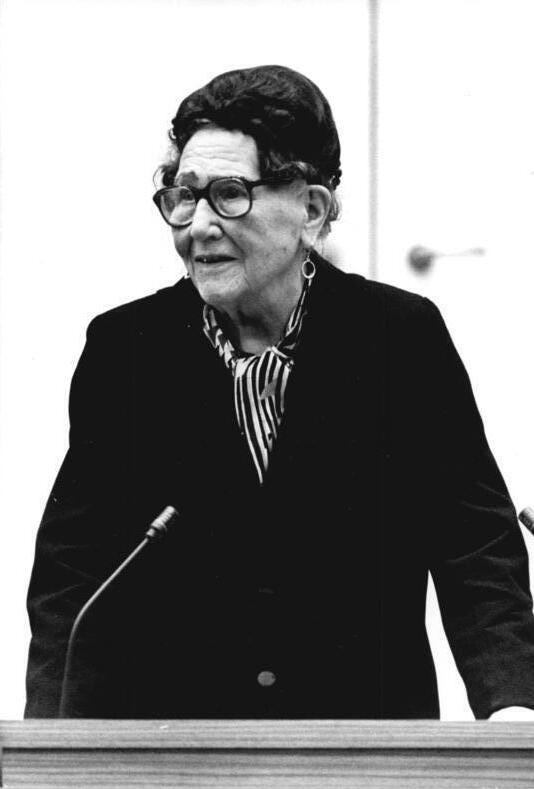 ADN-ZB/Mittelstädt 16.6.86- Berlin: 1.Tagung der Volkskammer Die Abgeordnete Wilhelmine Schirmer-Pröscher hielt gemäß der Geschäftsordnung der Volkskammer als ältestes Mitglied der Obersten Volksvertretung in der konstituierenden Tagung die Eröffnungsrede und leitete die Sitzung bis nach der Wahl des neuen Präsidiums.